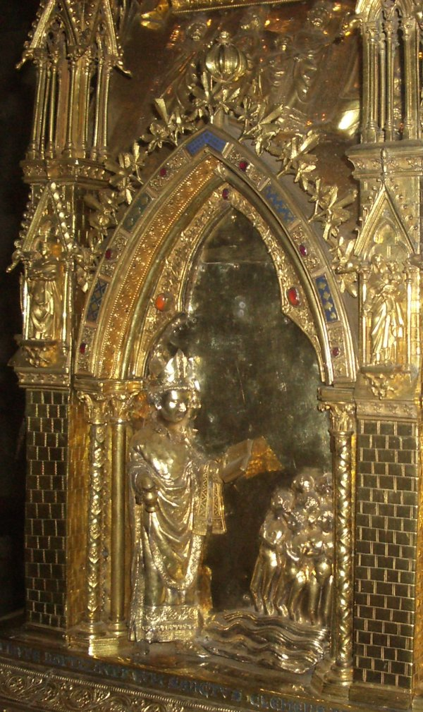 Saint Taurin évangélisant les païens (détail de la Châsse)